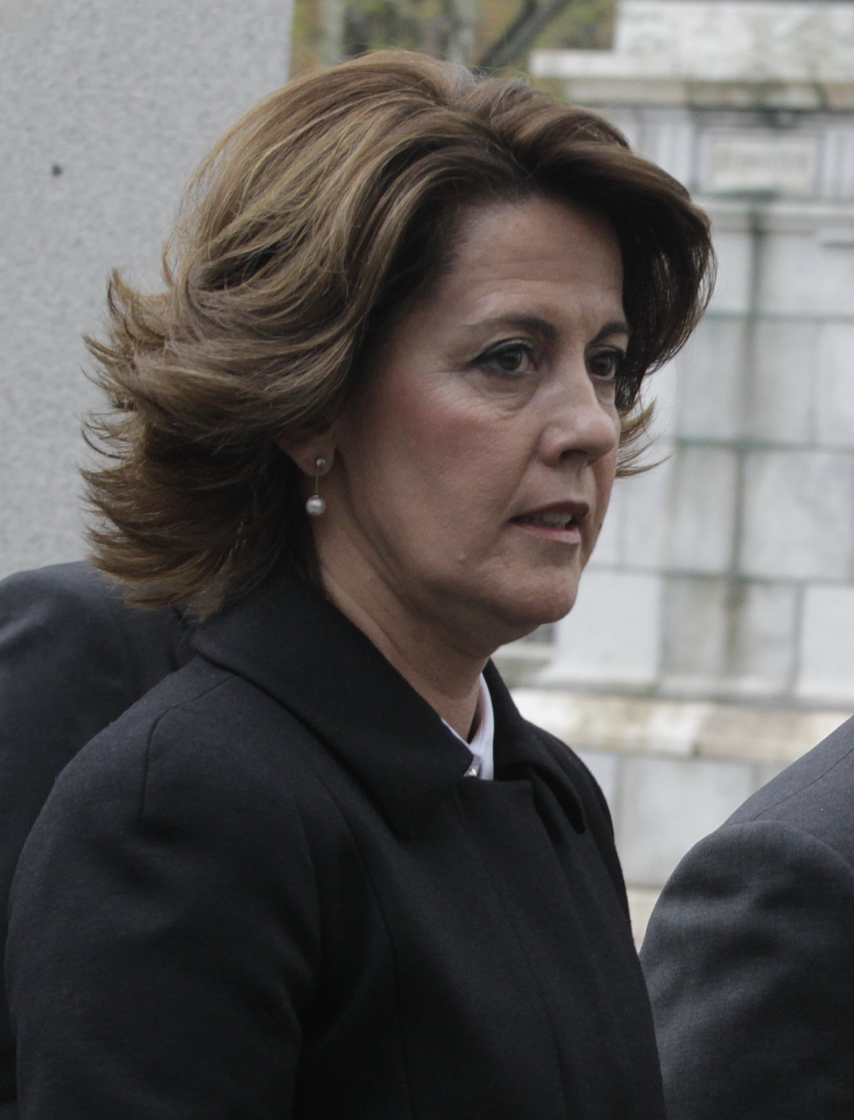 El lehendakari ha asistido al funeral de Estado por Adolfo Suárez